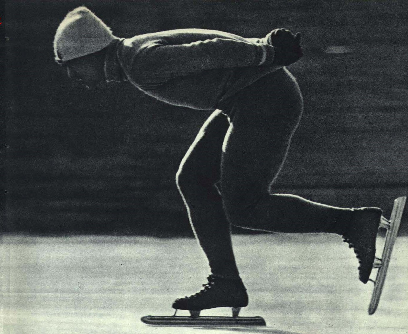 1963-02 1963年 滑冰